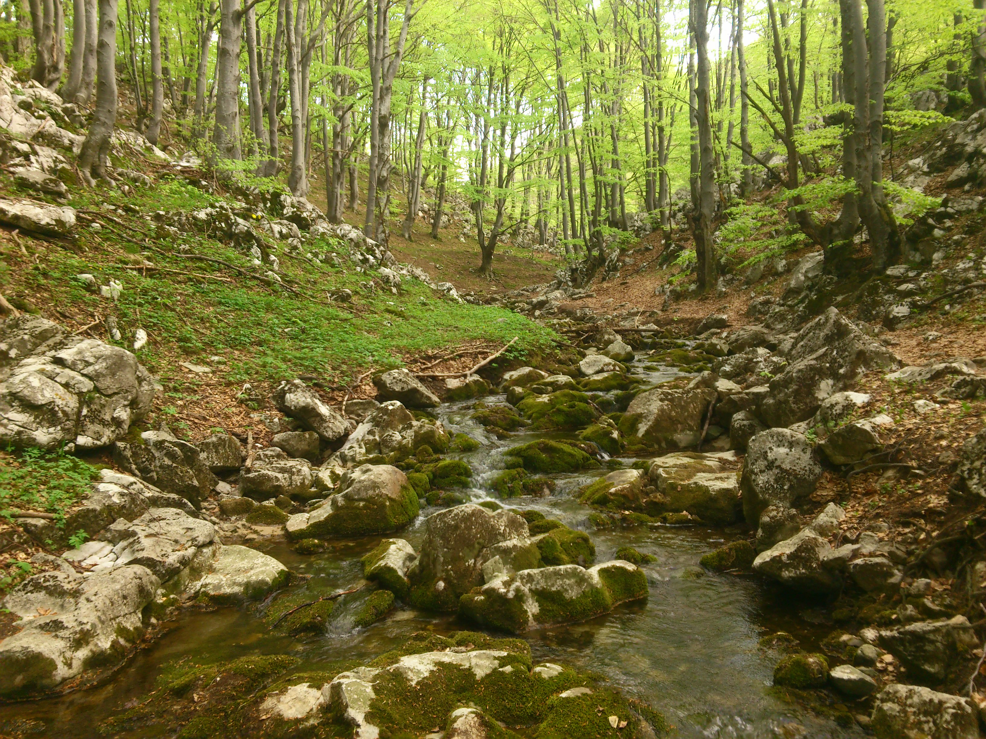 Врачански Балкан, Гората над водопад Боров камък, Врачански Балкан - пролет 2012